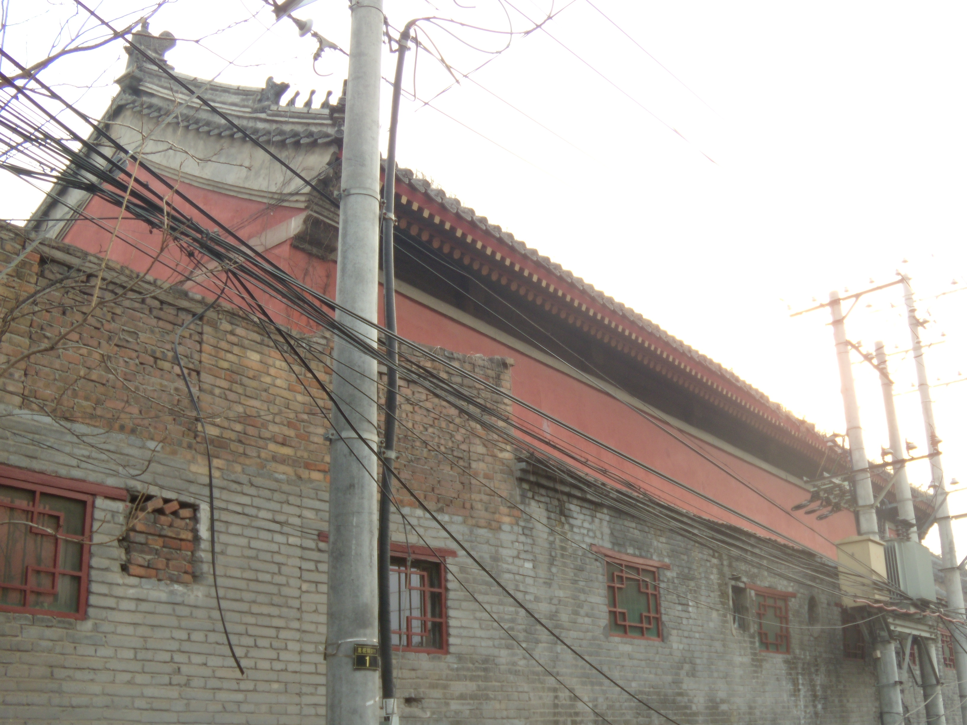 嵩祝寺北侧